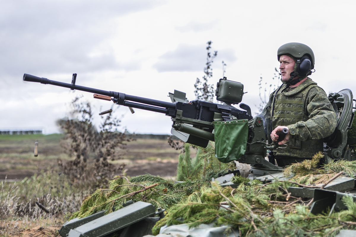 Танковый пулемёт 6П49 на танке Т-72Б3 обр. 2016 на учениях Запад-2017.